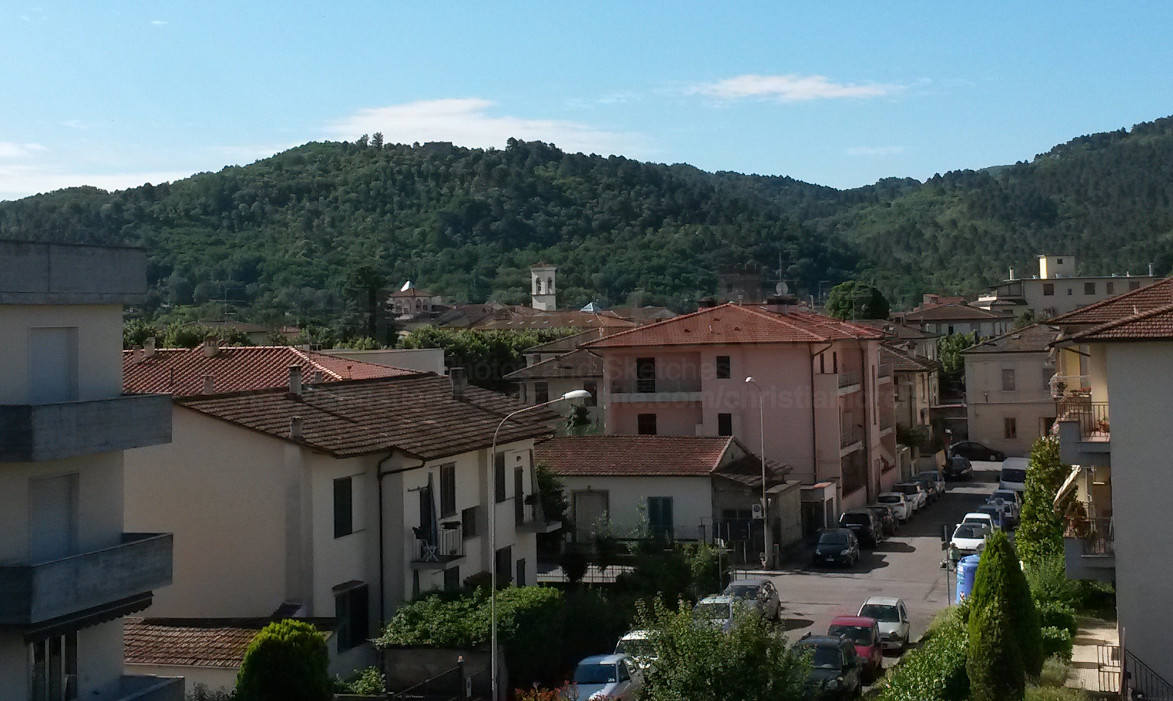 Vista su Vicchio con il campanile in lontananza. Sullo sfondo Montesassi.